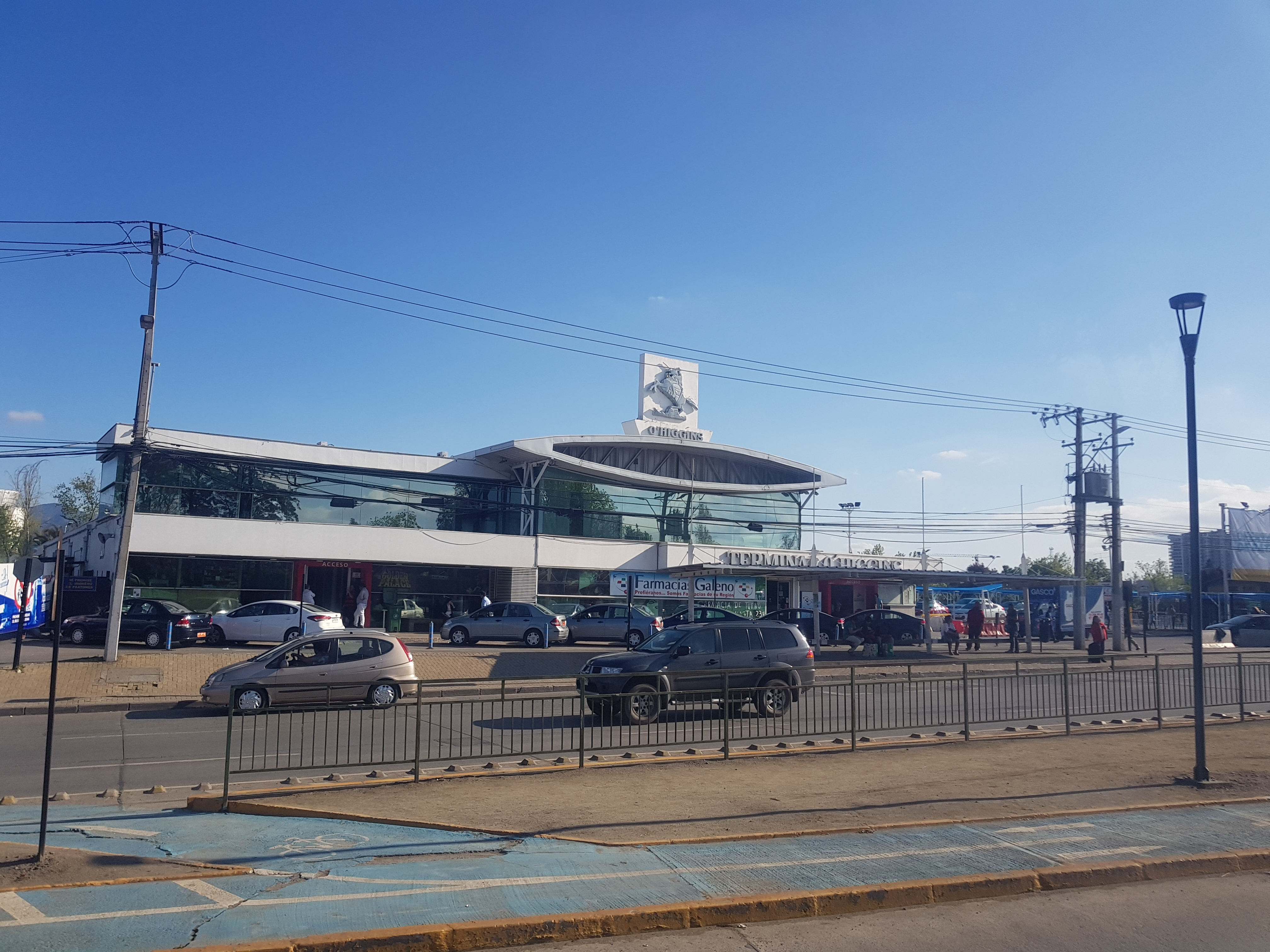 Terminal O'Higgins, principal terminal de buses interurbanos de Rancagua